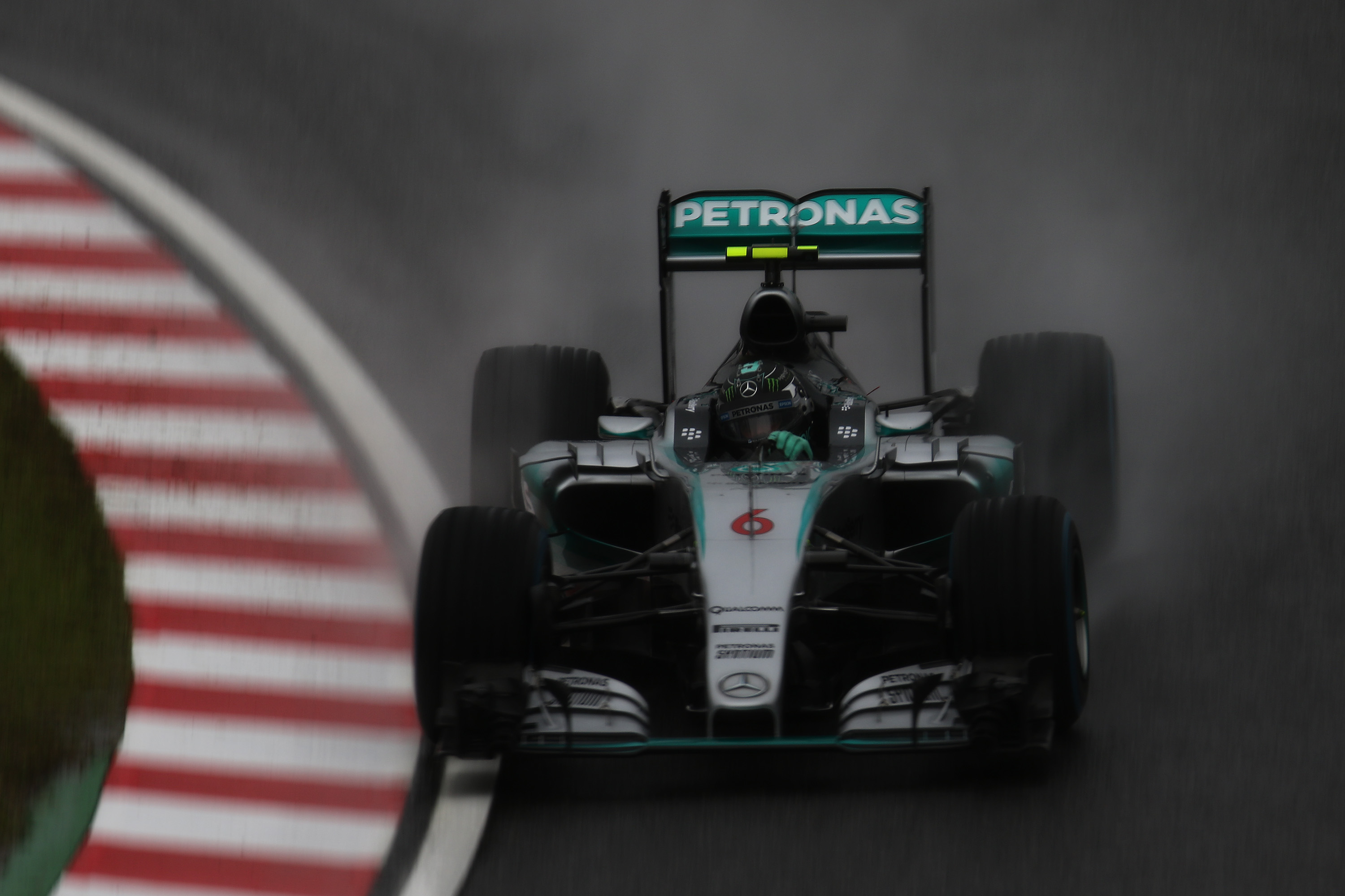 2015.9.25 F1 Rd.14 Suzuka FP2 Mercedes (W06 Hybrid) 6 ニコ・ロズベルグ [7D2_3906ks]